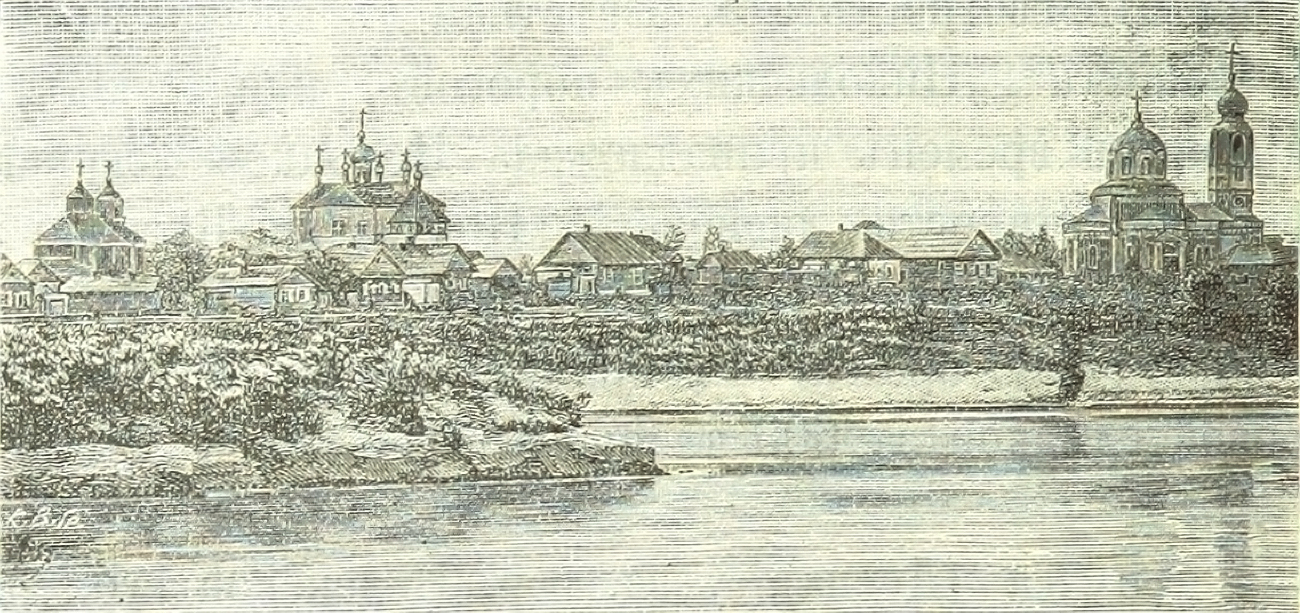 Беларуская (тарашкевіца): Дзісна (Dzisna), рака Дзьвіна (Dźvina)